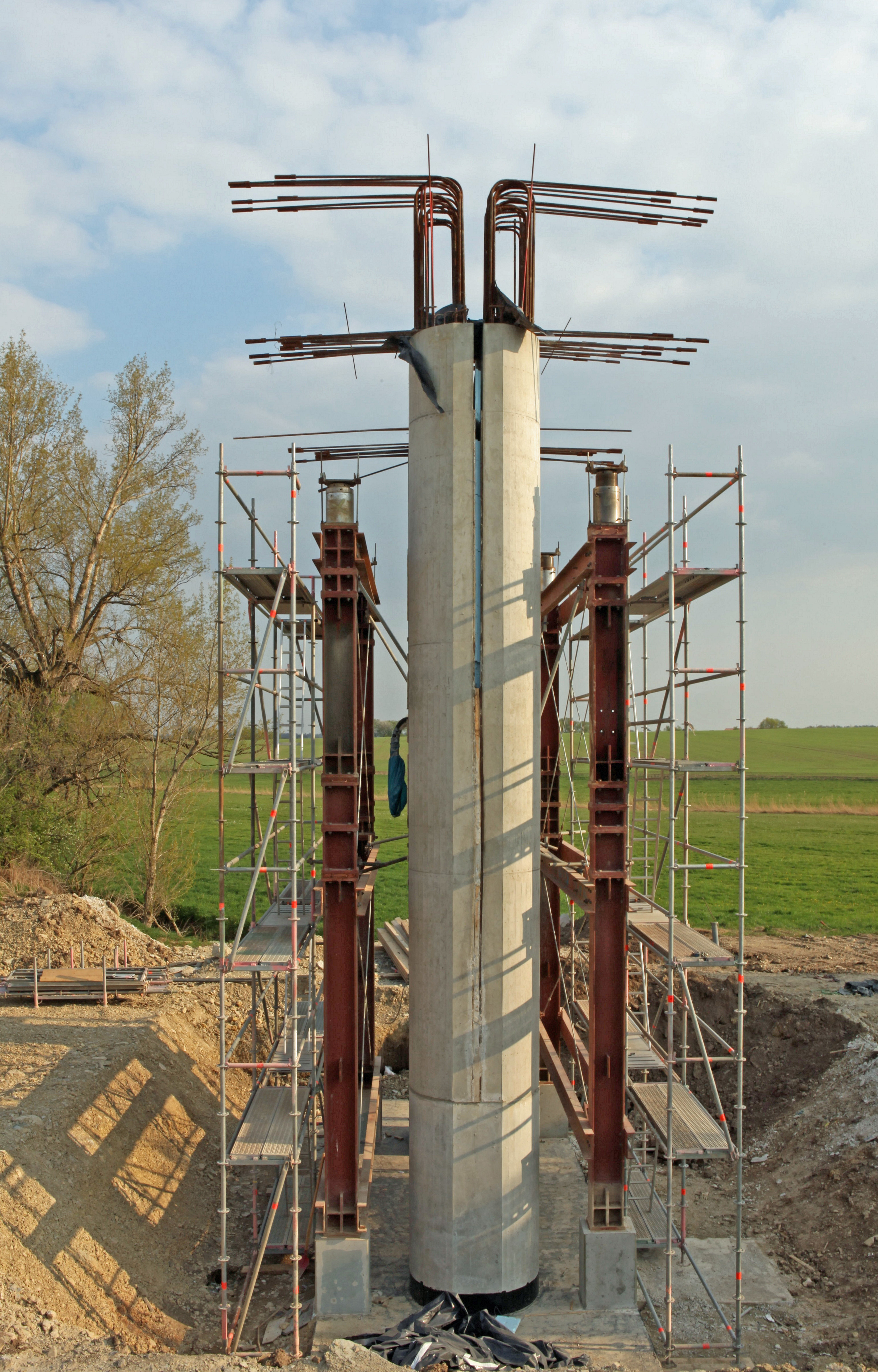 Stöbnitztalbrücke bei Oechlitz im Saalekreis in Sachsen-Anhalt